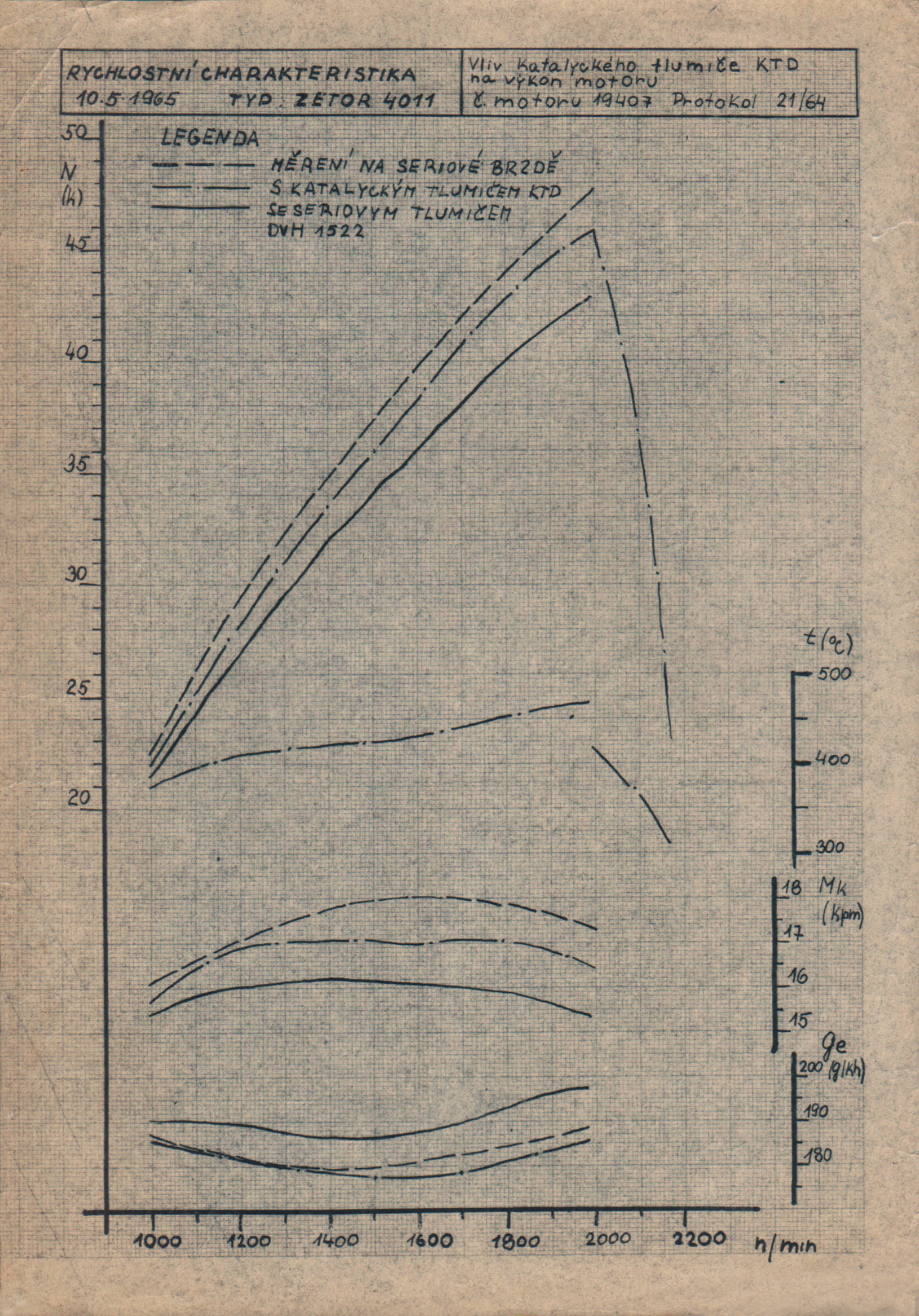 Graf srovnává výkon motoru s klasickým tlumičem a s katalyzátorem